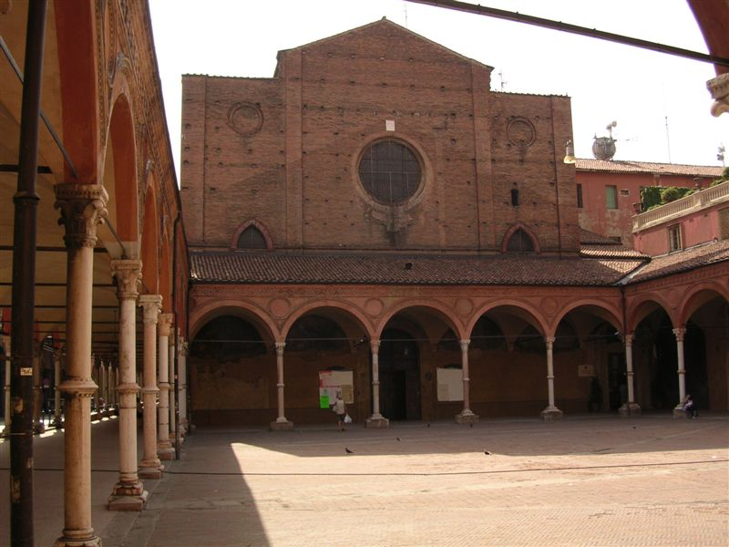 Santa Maria dei Servi in Bologna. Picture by Paolo carboni (myself)